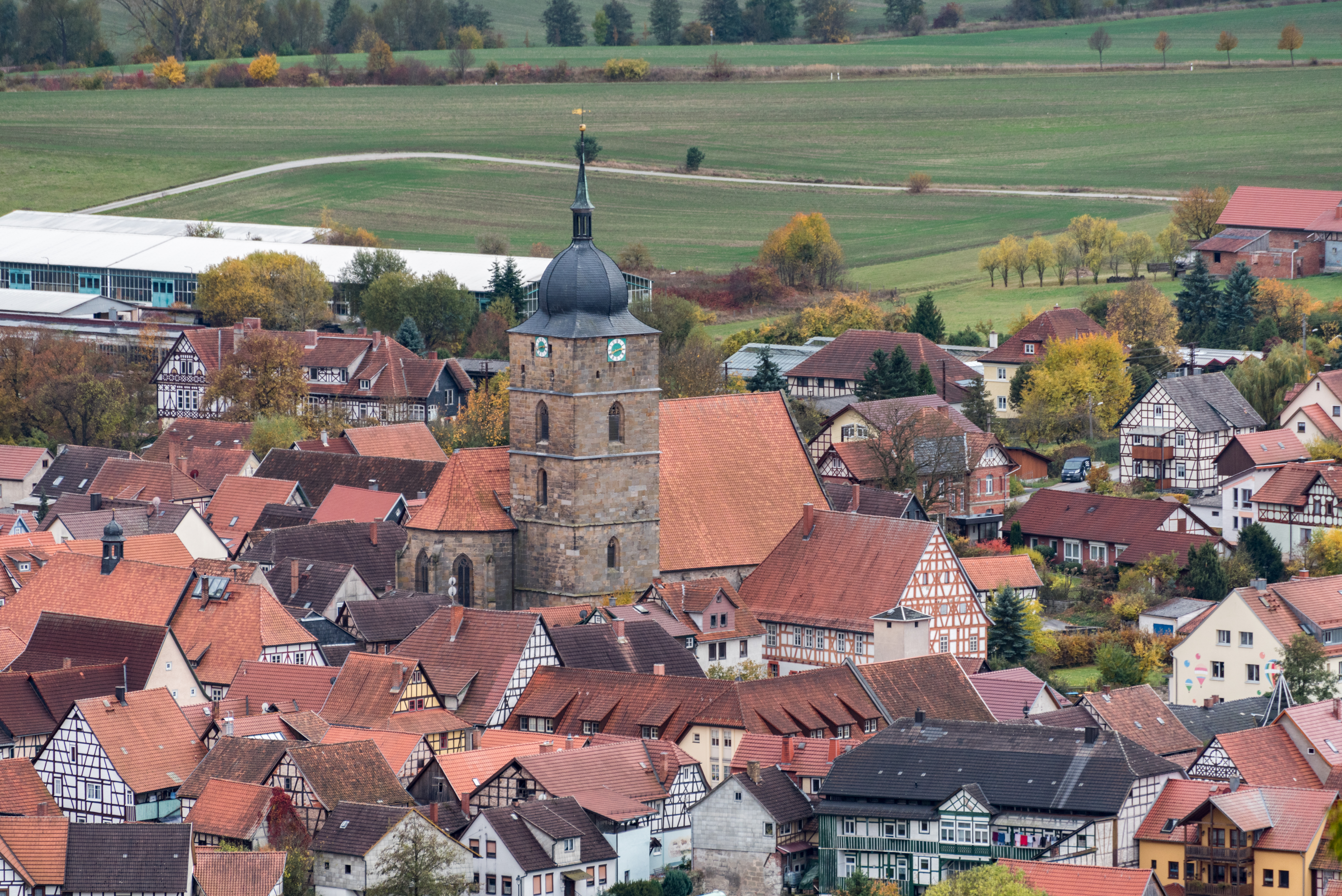 Heldburg, Altstadt, Ansicht von der Veste Heldburg